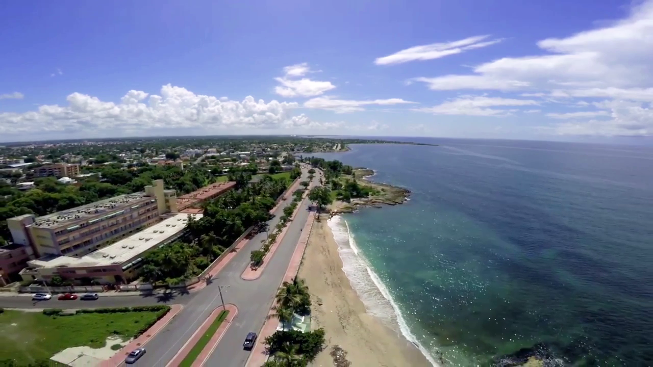 Boulevard del Malecón de SPM